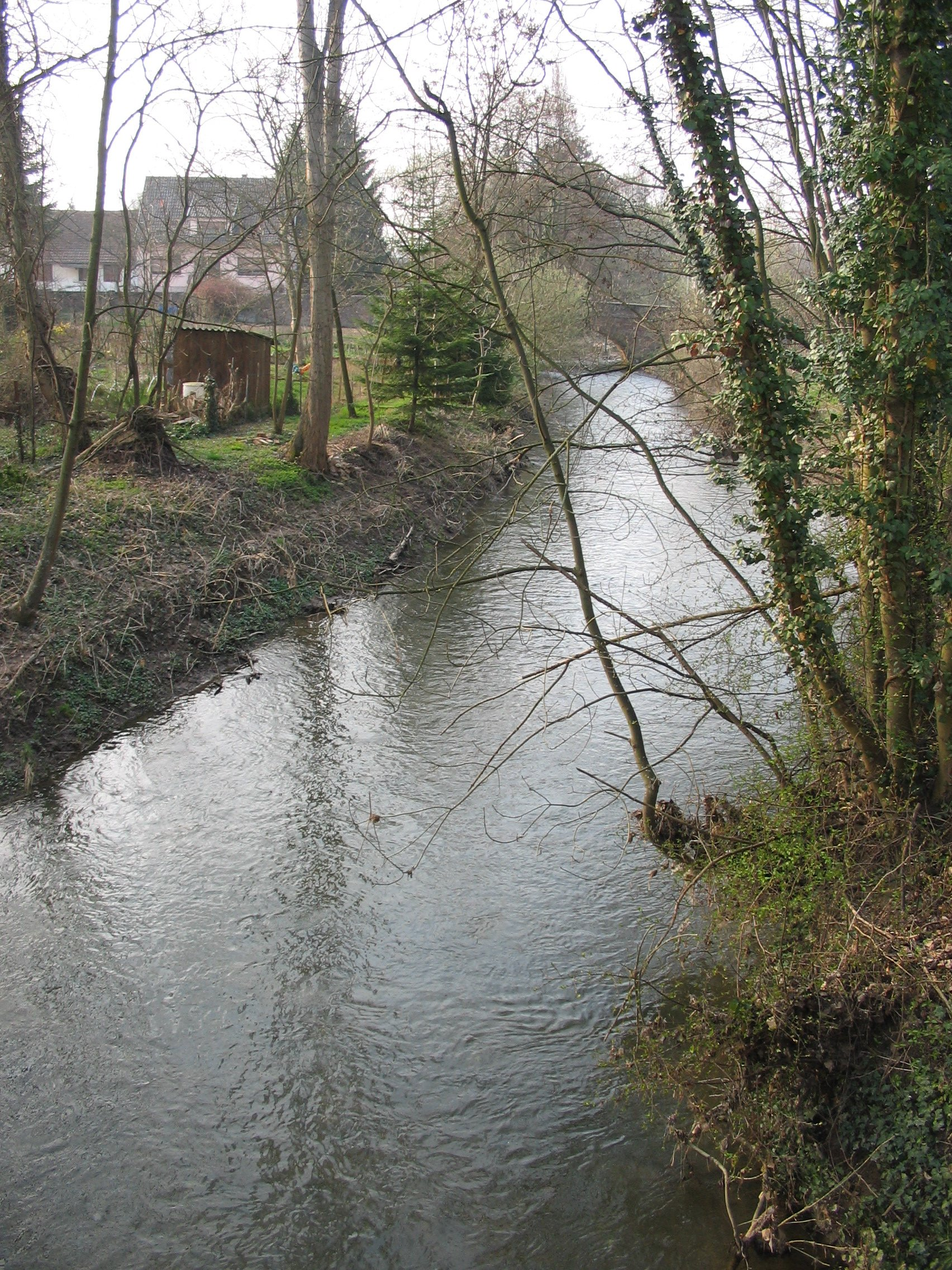 La Mossig à hauteur de Soultz-les-Bains (Bas-Rhin)